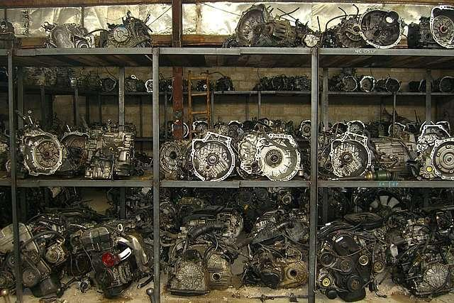 акпп для авто